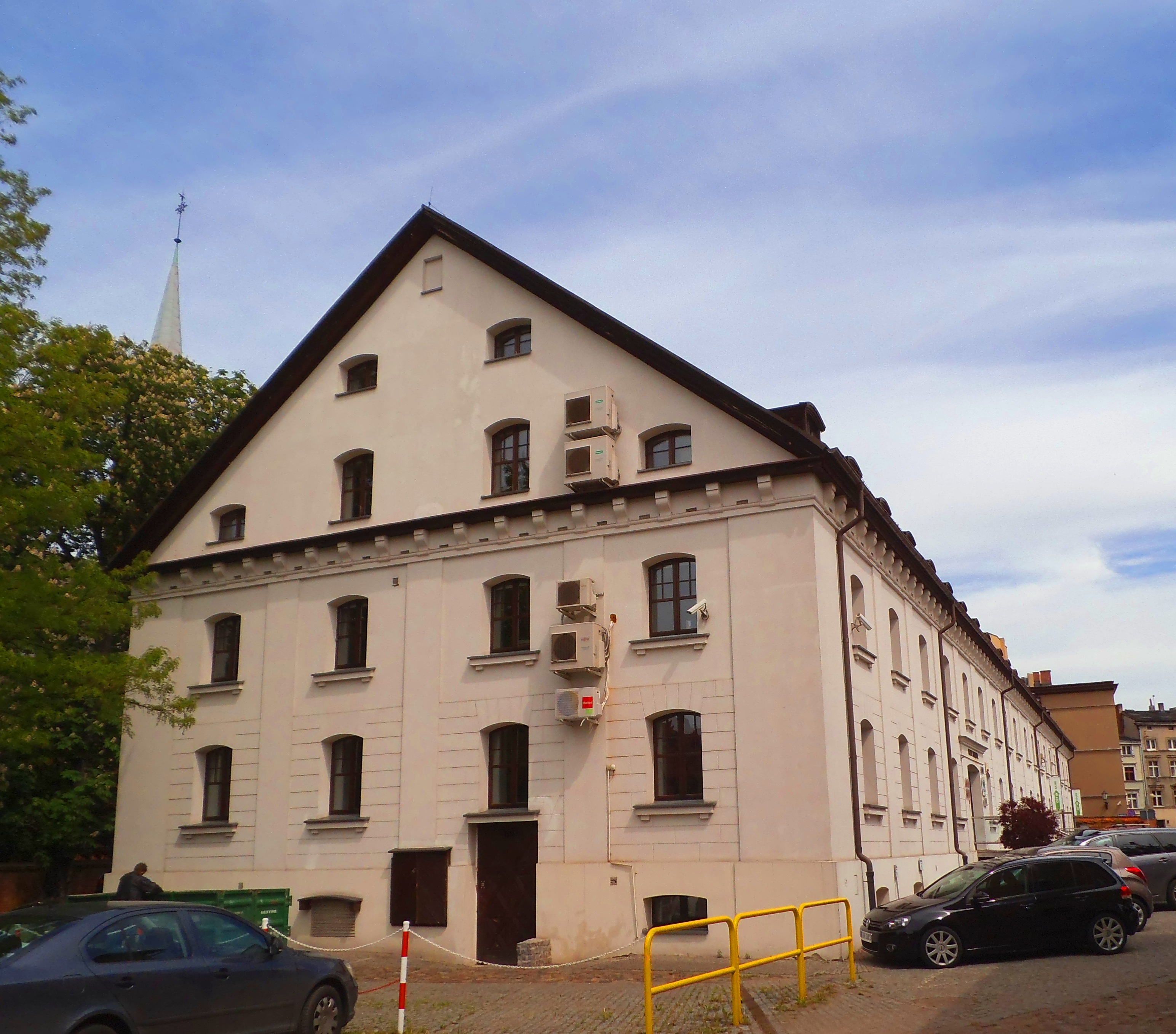 Nowy Arsenał w Toruniu